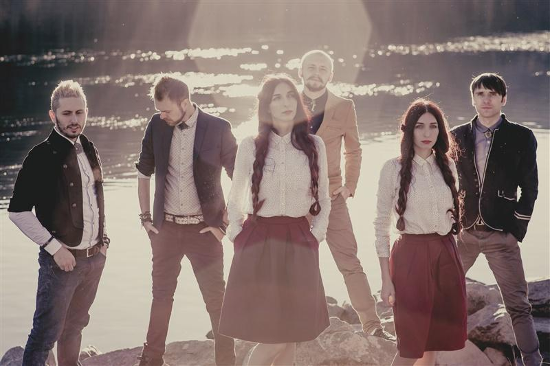 Atmasfera while tour in Norway, 2015